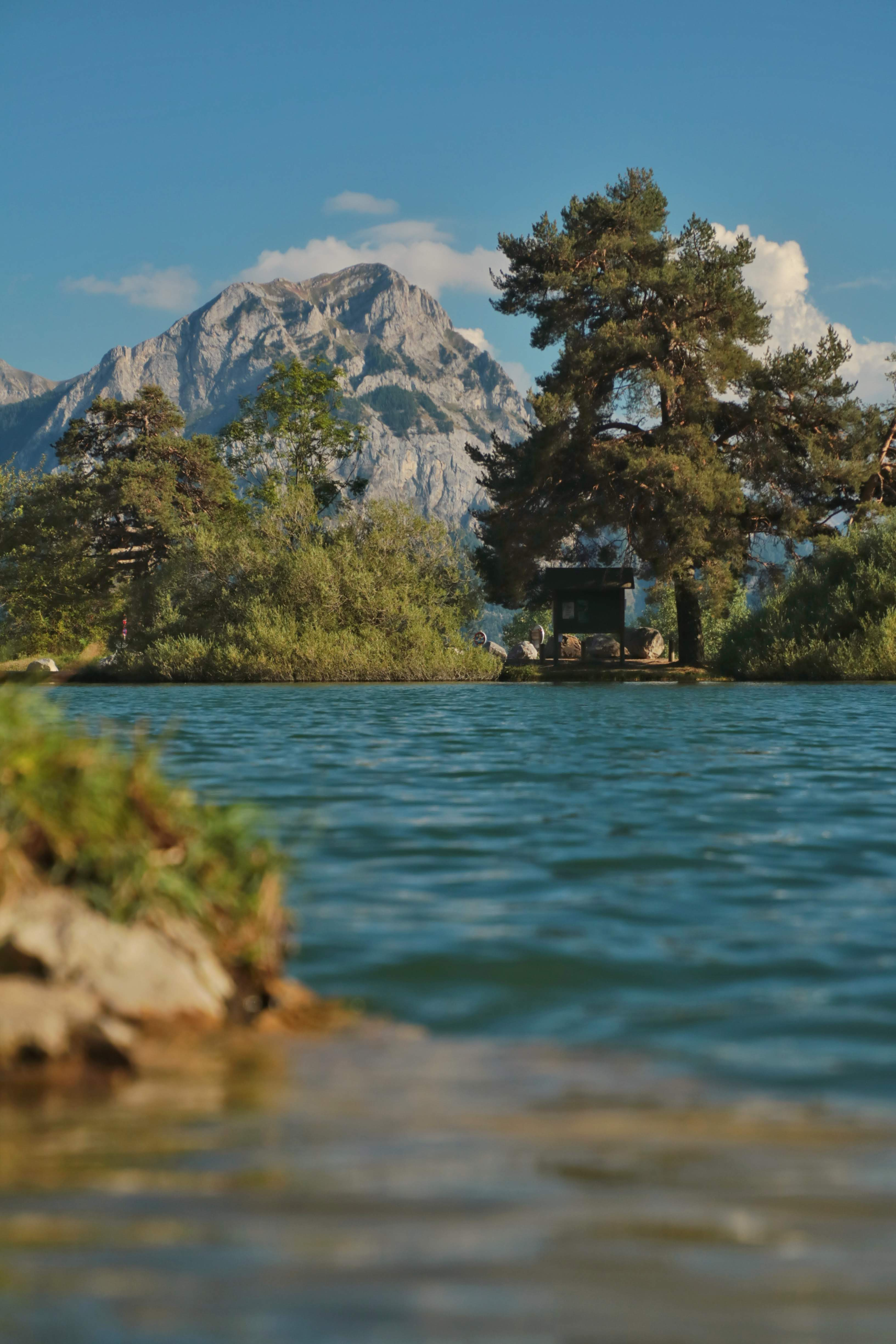 Vue sur le pic de Morgon depuis le bord du lac de Saint-Apollinaire